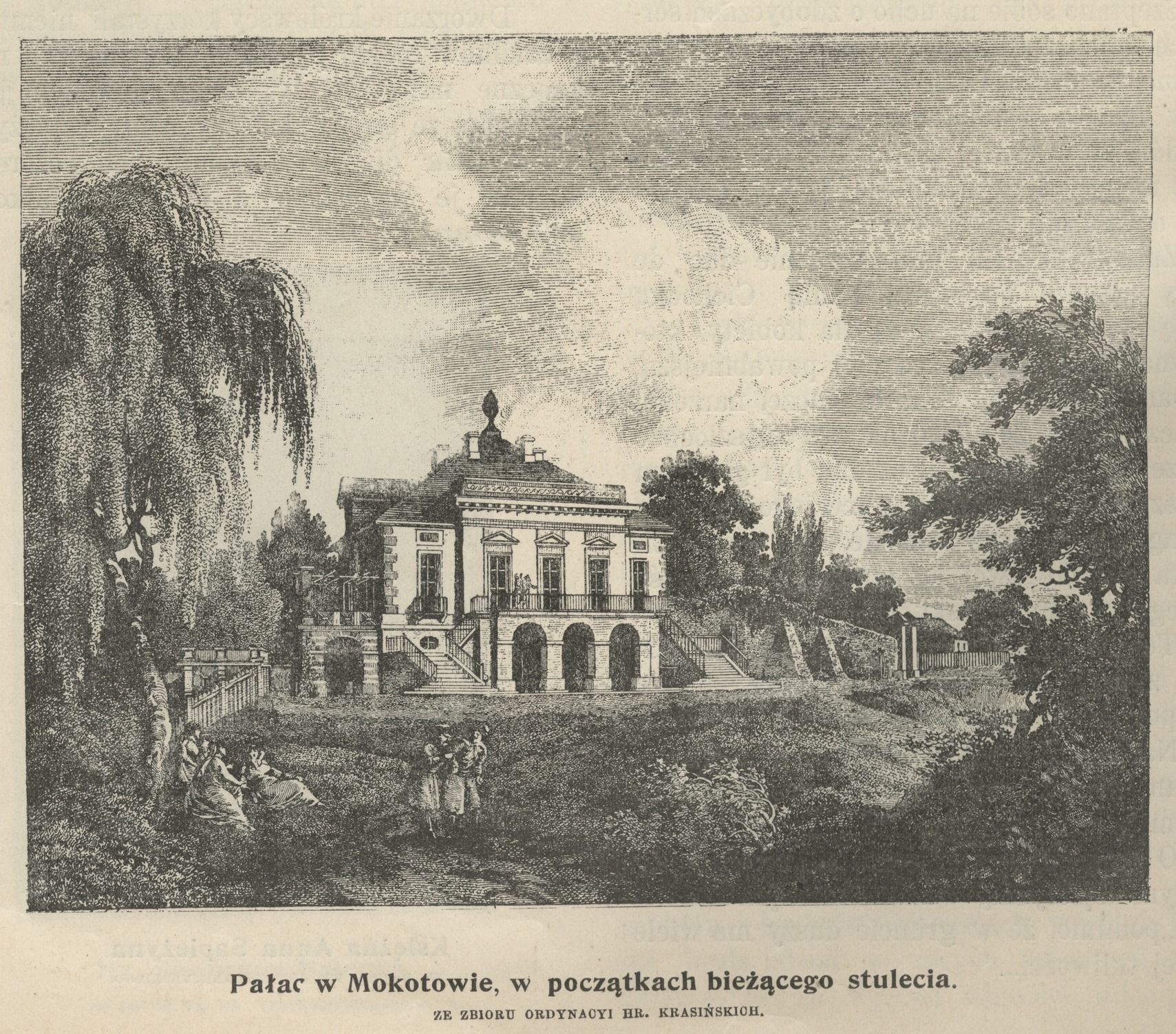 Pałac w Mokotowie w początkach bieżącego stulecia